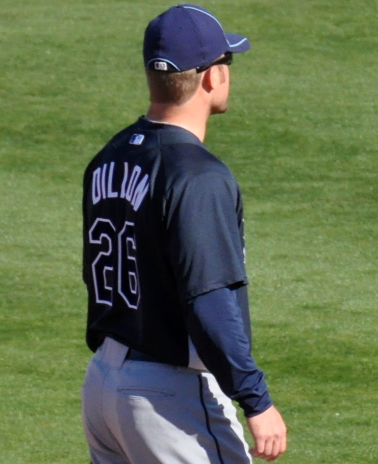 Phillies